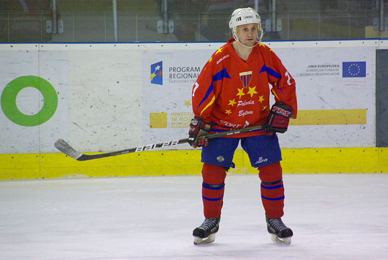 Mariusz Puzio w barwach Polonii Bytom podczas meczu na Mistrzostwach Polski Oldboyów w Sanoku (Arena Sanok, 2012)